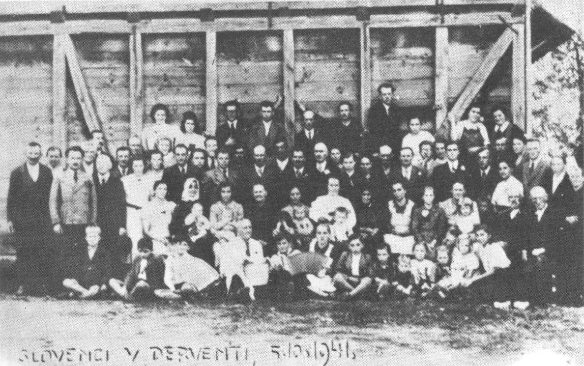 Slovenski izgnanci v Derventi.